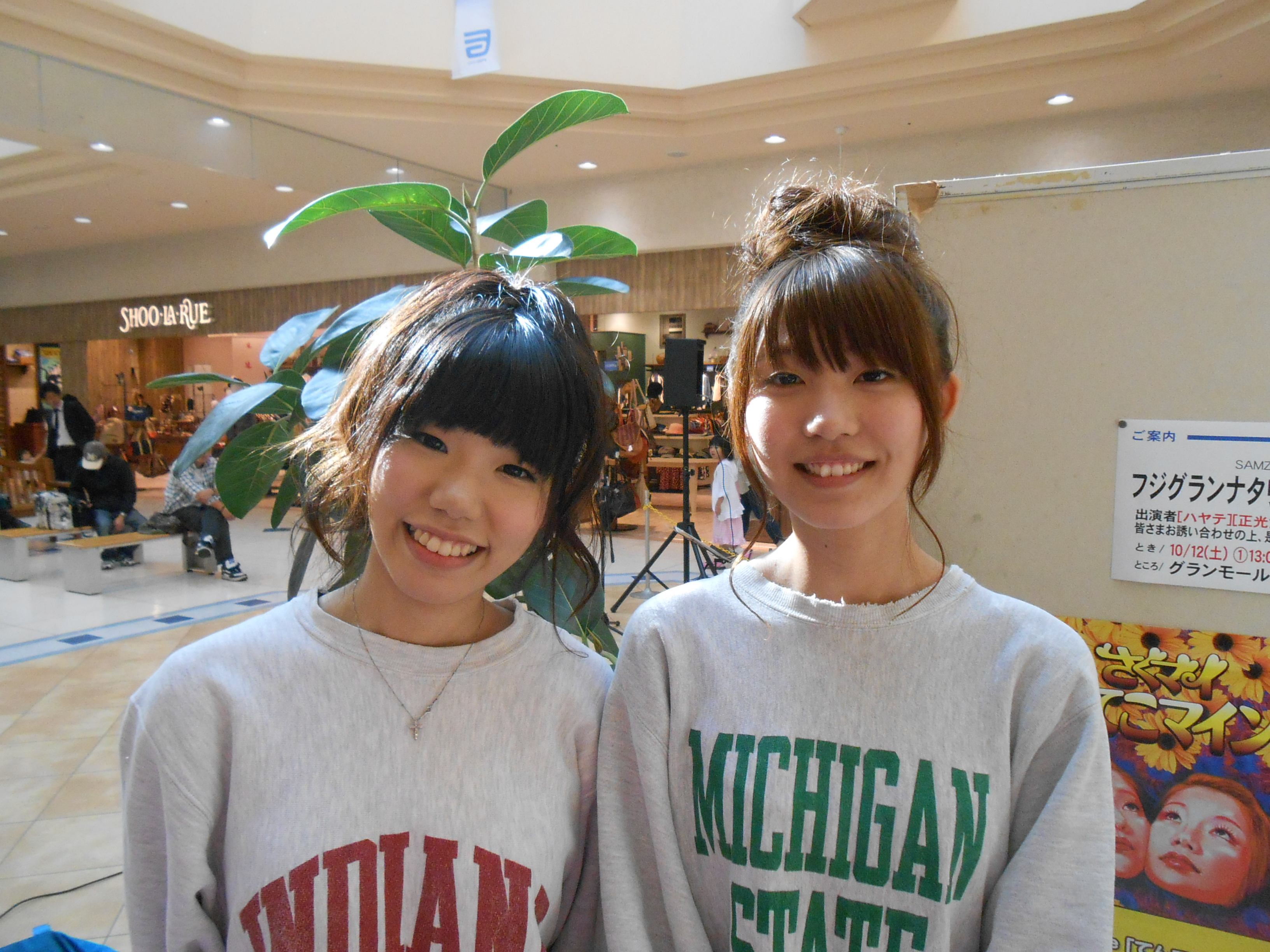 さくマイオフショット